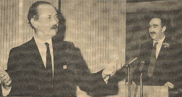 Zygmunt Zaremba i Albert Carthy na 100-leciu Międzynarodówki Socjalistycznej w Brukseli